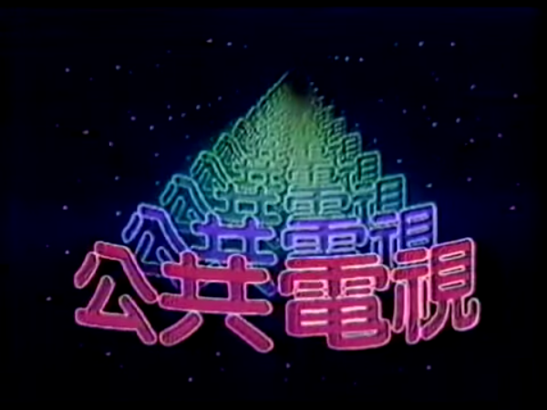 中文（台灣）: 中華民國公共電視節目1986年版片頭，為電腦動畫，最後帶出宇宙中的「公共電視」字樣。